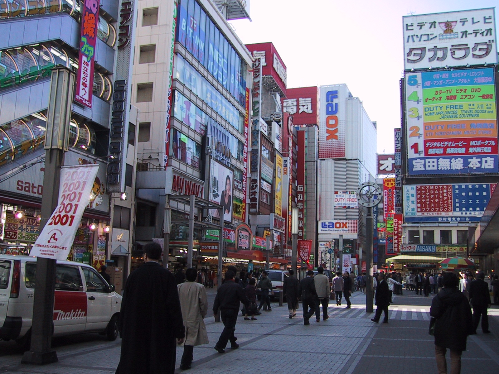 Ein weiteres Bild von Akihabara bei Tage.